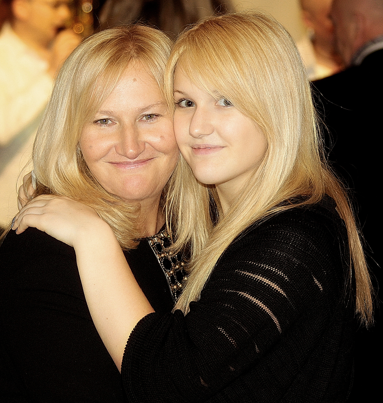 Yelena Baturina and daughter